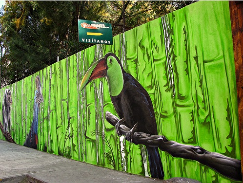 vida silvestre ixtapaluca